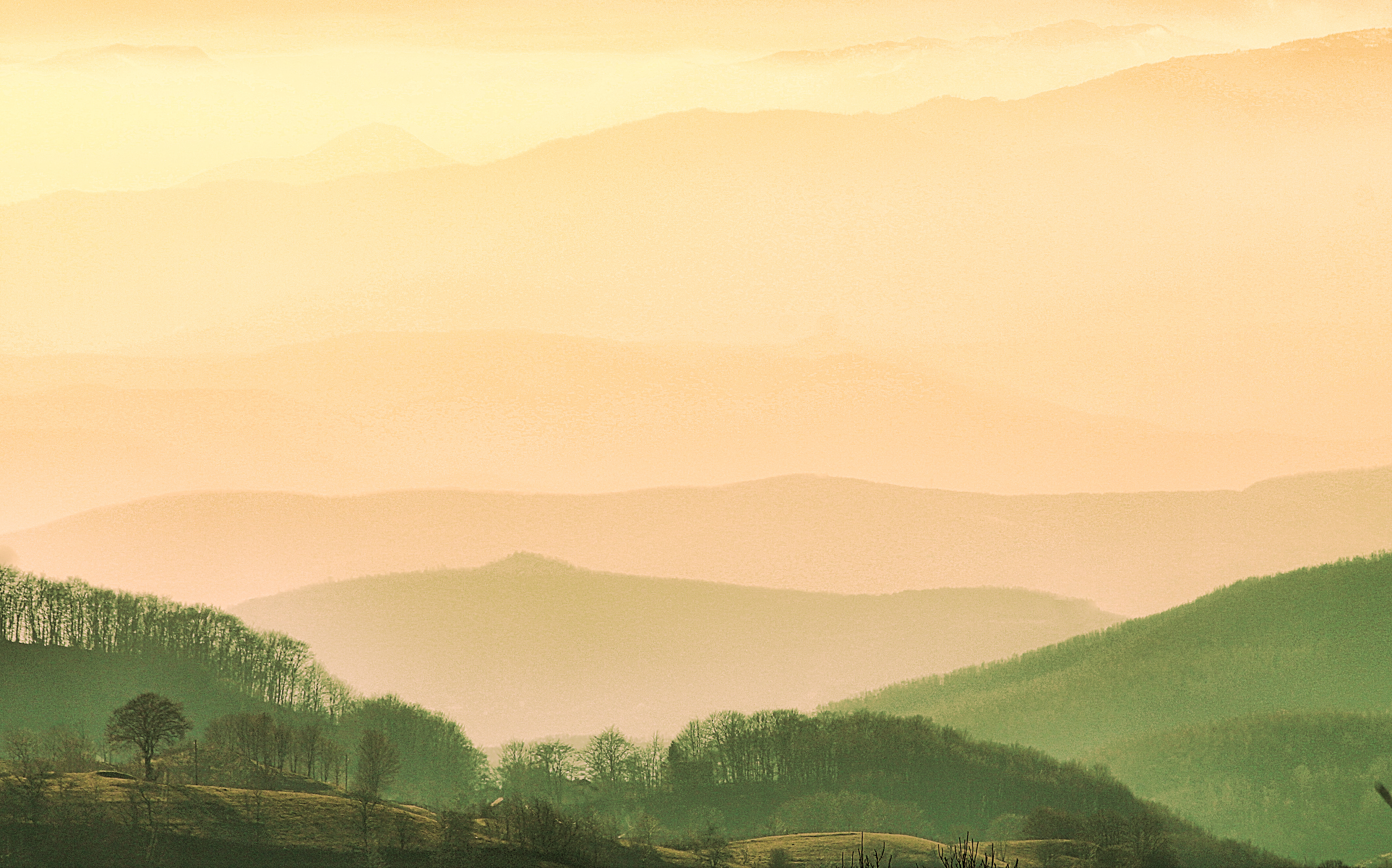 Shala e Bajgorës